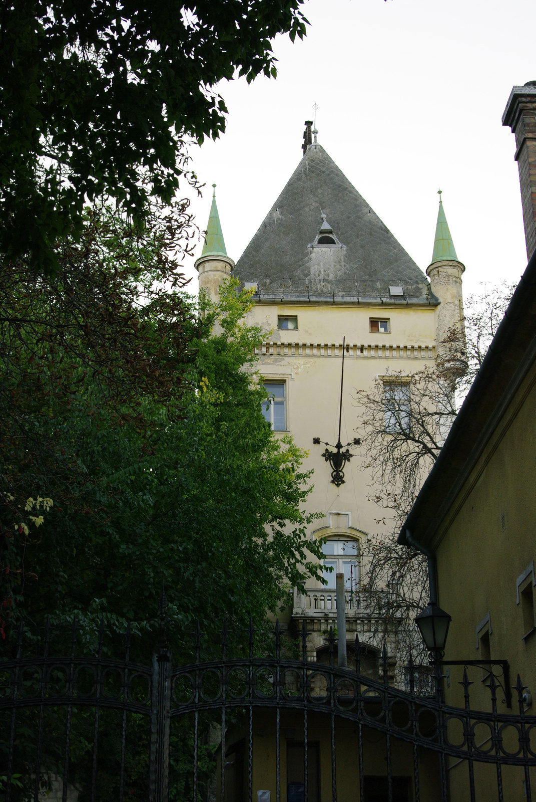 Törley-kastély (Budapest 22, Anna u. 5.)